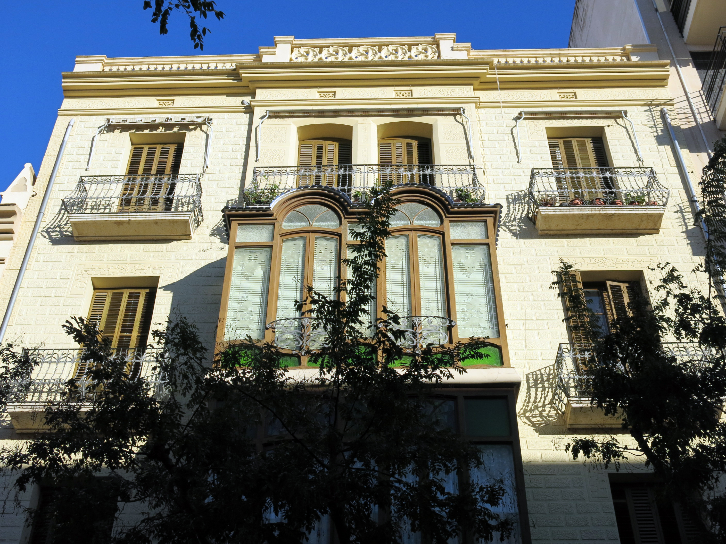 Casa Albacar (Tortosa)